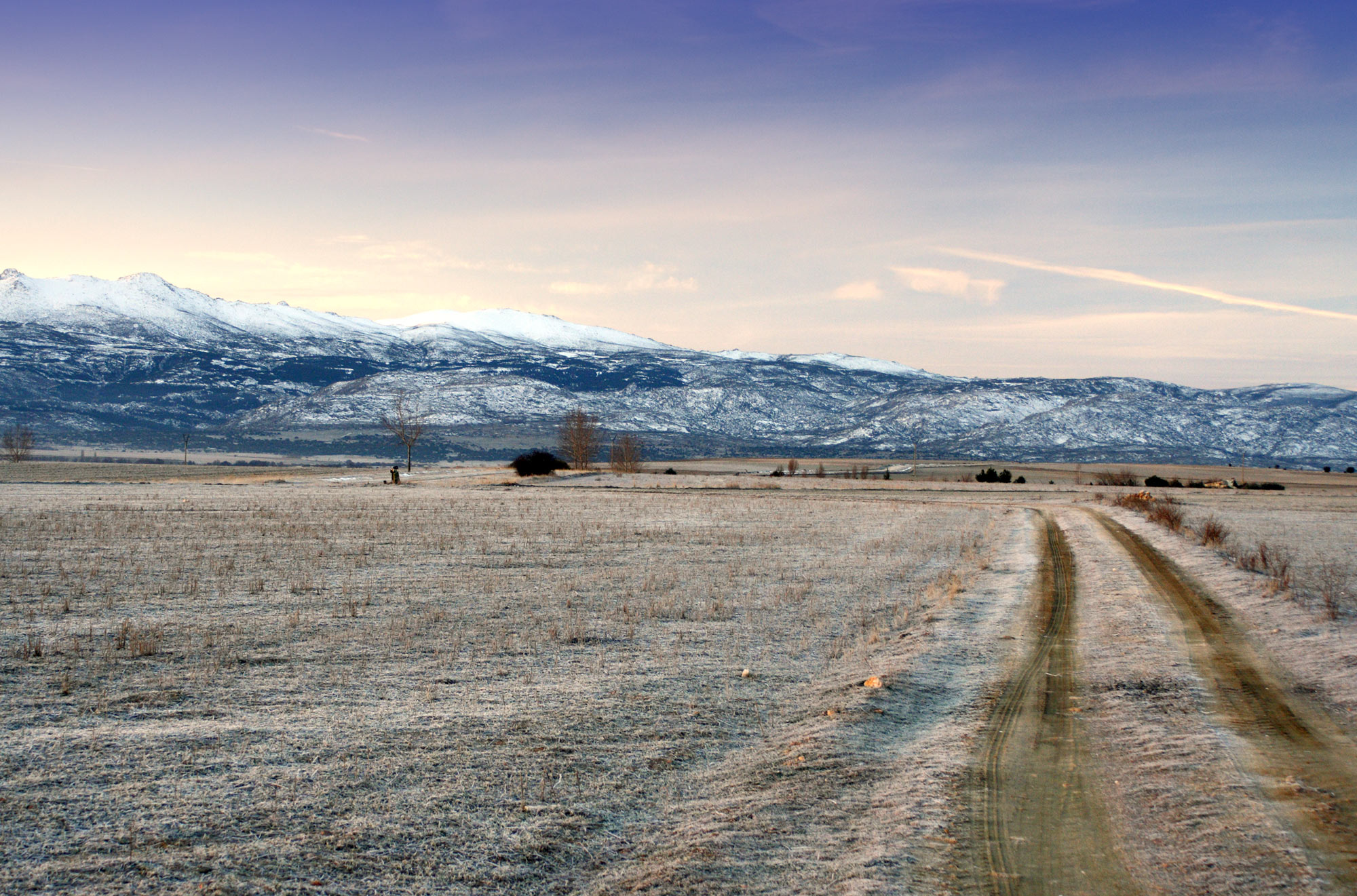 Llanuras en la provincia de Ávila, España.